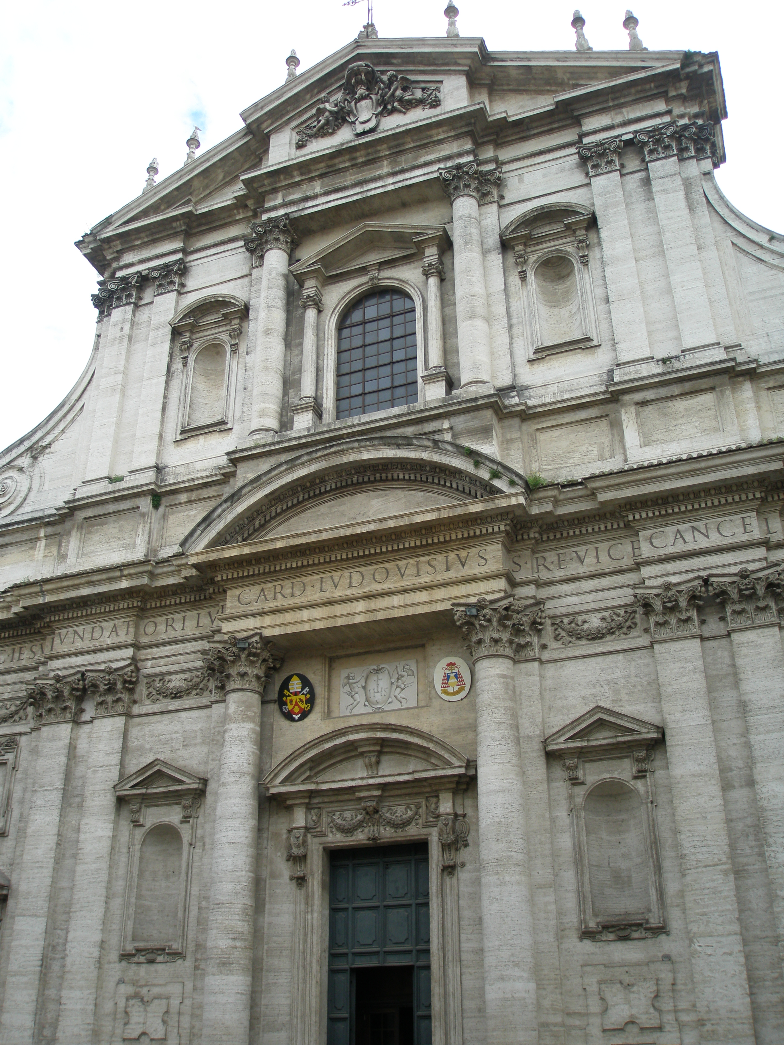 Chiesa di Sant'Ignazio, Facciata, Roma, Orazio Grassi (con Carlo Maderno, Paolo Marucelli, Orazio Torriani), 1626-85. 8/3/2007 by Council